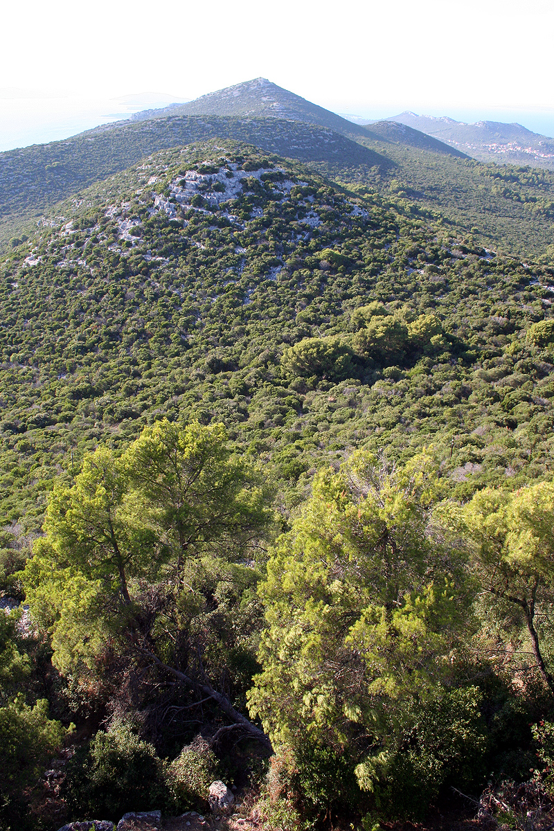 Ugljan, from st Mihovila